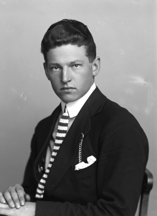 Rolf Krag, fortografert en gang før 1940.